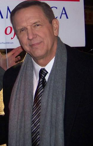 Charlie Gibson in Manchester, NH